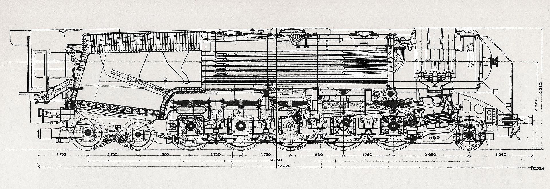 Dessin d'époque d'une coupe longitudinale de la locomotive 152 étudiée par la DEL.